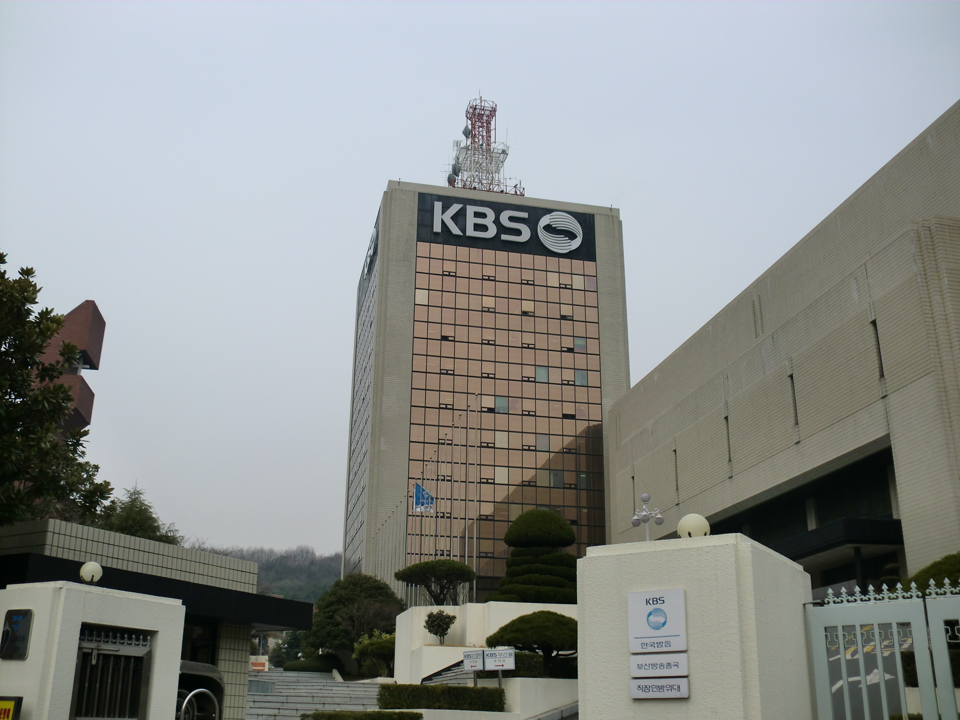 한국방송공사 부산방송총국